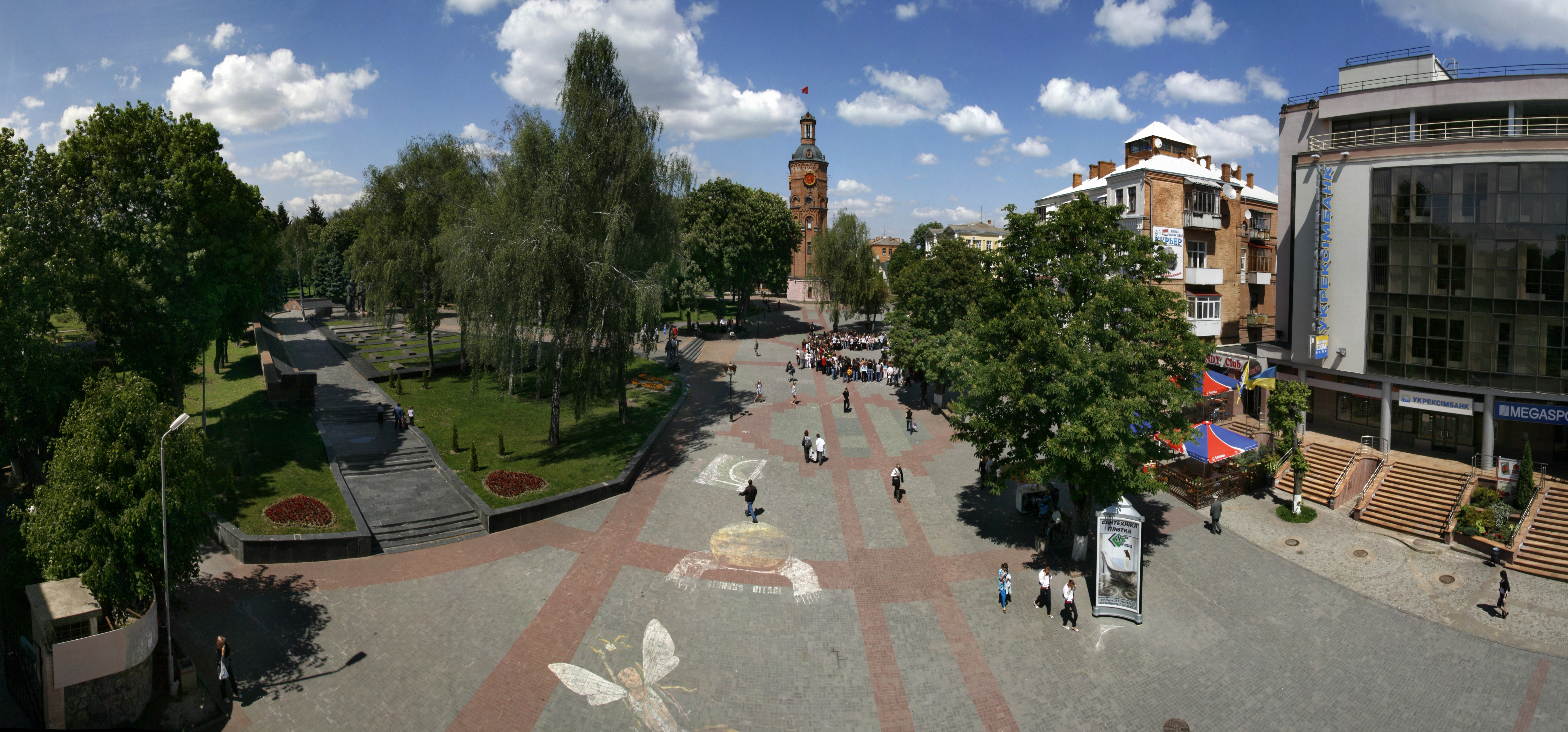 Європейська площа. Вид на вежу